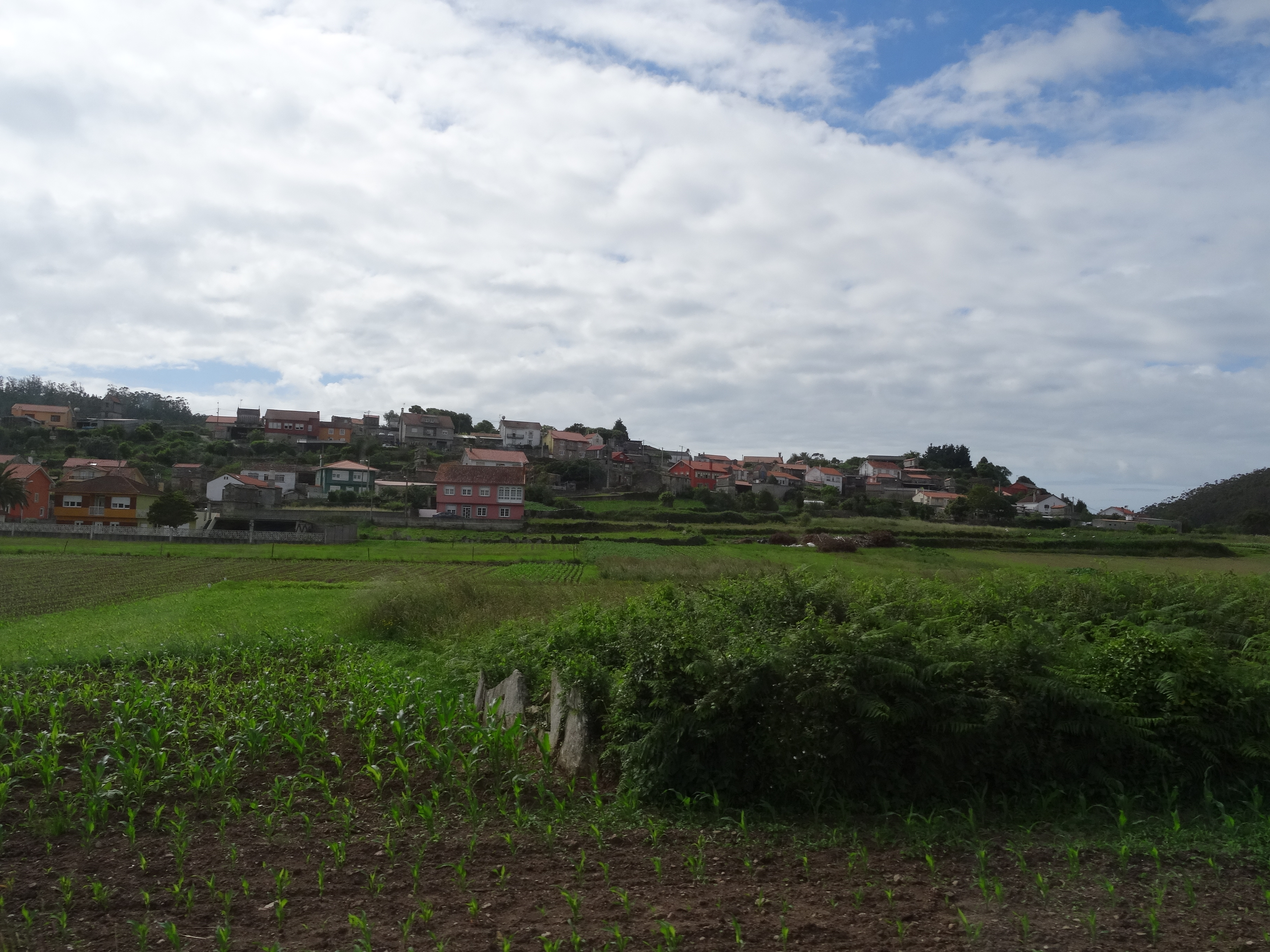 Lugar de Ponteceso.